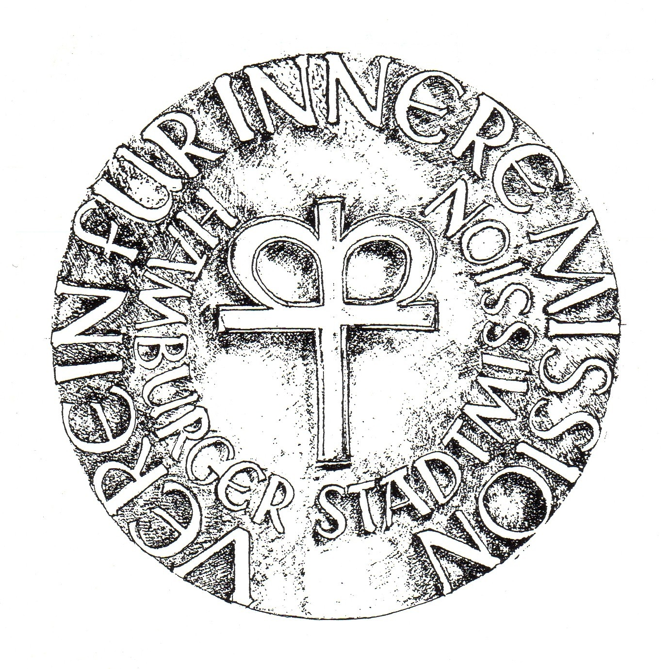 Logo der Hamburger Stadtmission